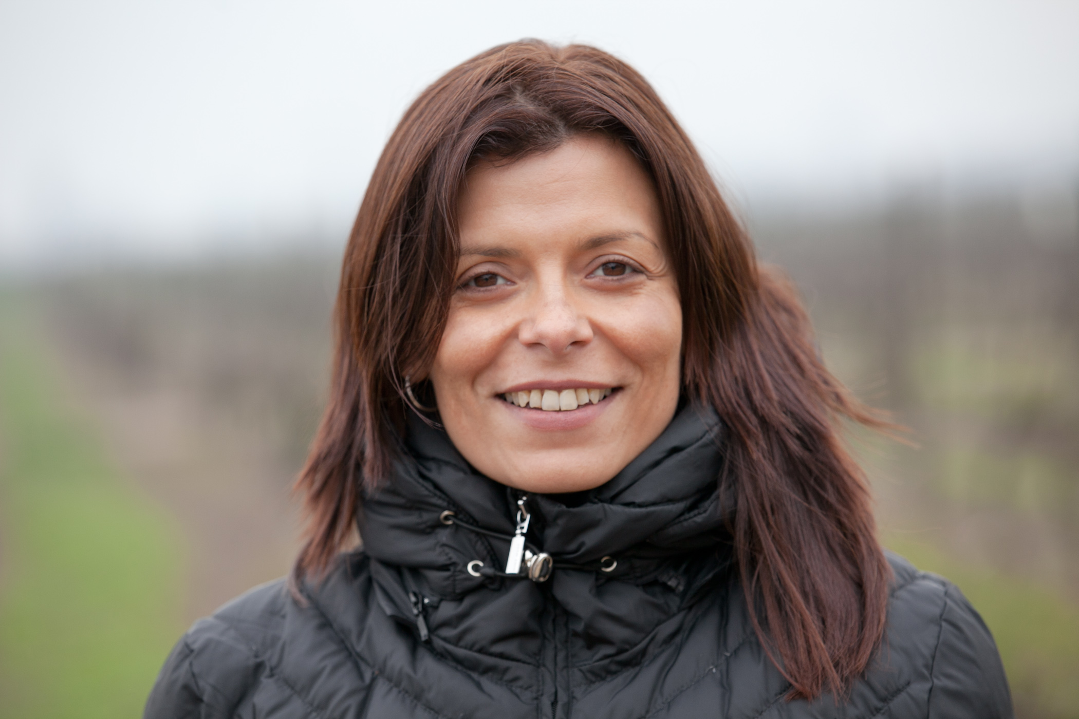 Giannina Segnini, managing editor of La Nacion in San Jose, Costa Rica.